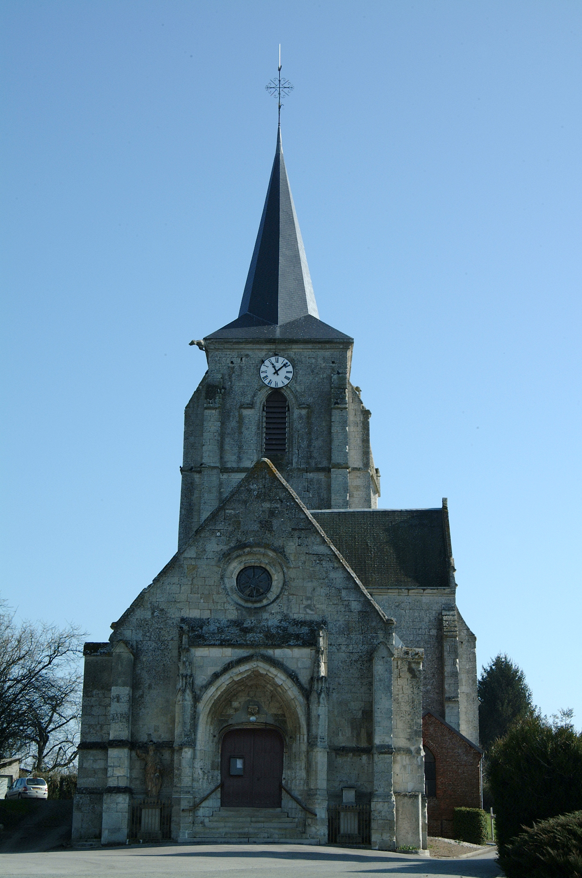 l'Eglise de Cempuis